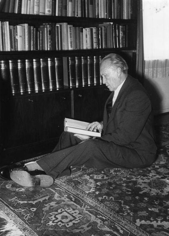 Ganz privat: Bundeskanzler Konrad Adenauer in seinem Haus in Rhöndorf.